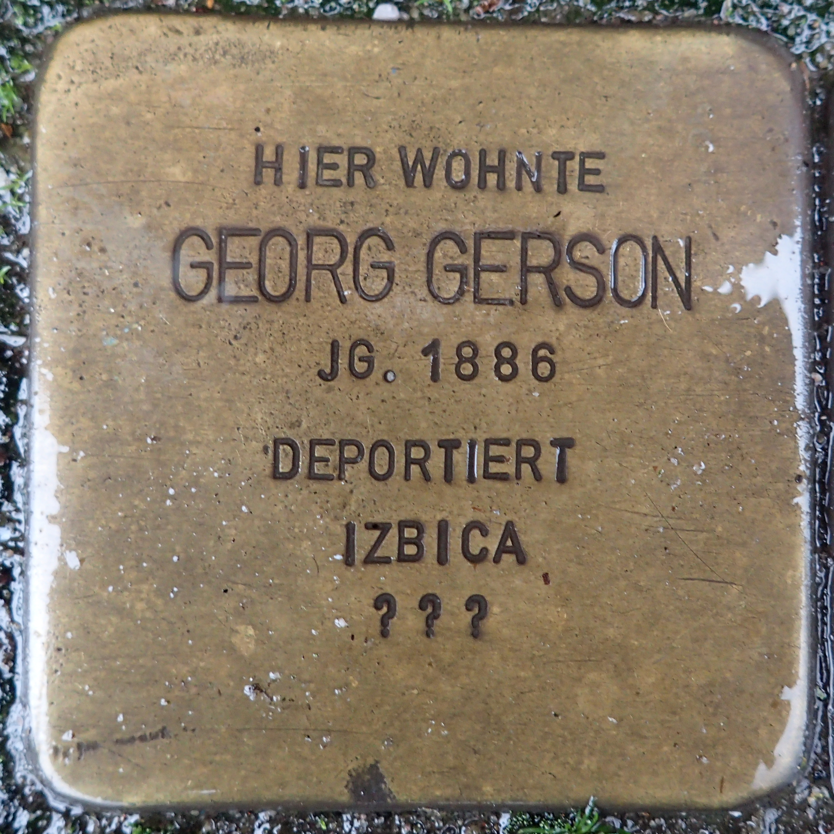 Stolperstein Geldern Bahnhofstraße 36 Georg Gerson